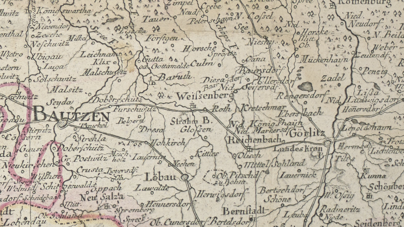 Ausschnitt Bautzen - Görlitz; Kt. : Grenzen kolor. (75 x 54 cm); Koordinaten E 9°53'00"-E 15°23'00"/N 52°33'00"-N 50°02'00"; Maßstab in graph. Form (Geographische oder Deutsche Meilen, Stundenweges). - Titel unten rechts. - Maßstab und Erkl. der Zeichen u. Abk. oben links. - Nullmeridian: Ferro. - Relief angedeutet: Schraffen